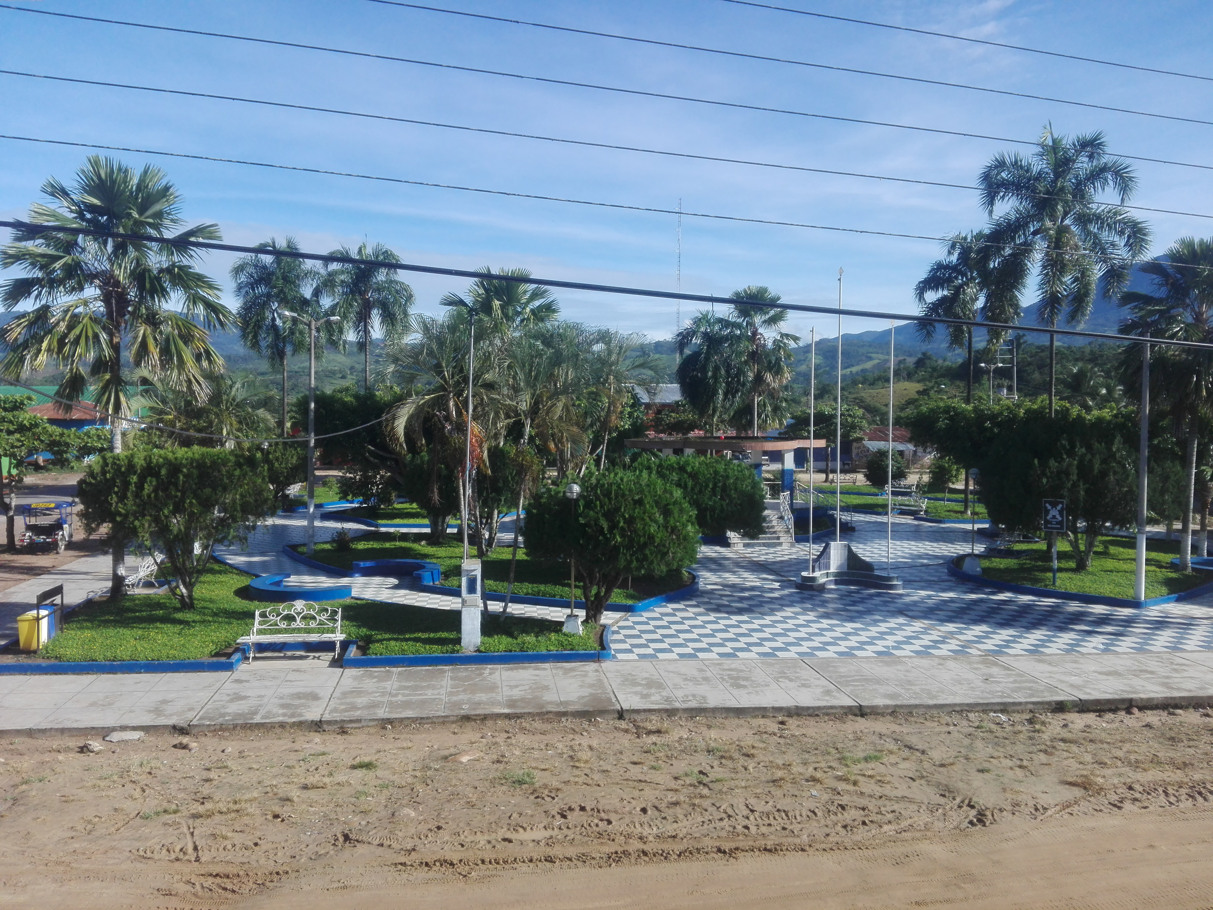 AMABLE Y ACOGEDOR